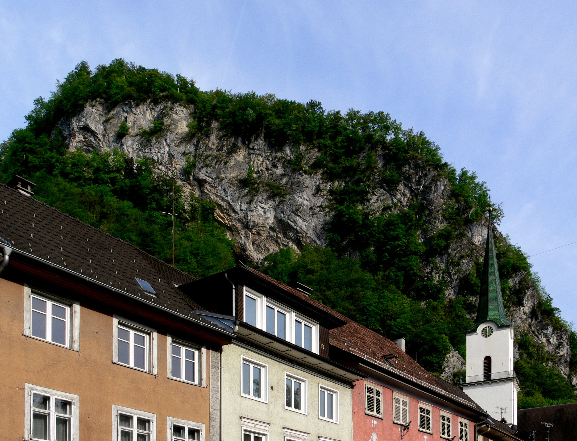 Blick von Hohenems zur Burgruine Alt-Ems